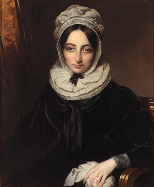 Pintura al óleo. María Teresa del Riego.